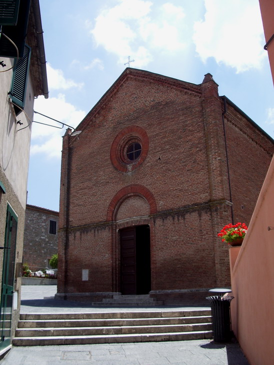 Facciata della chiesa di San Salvatore a Istia d'Ombrone (GR)